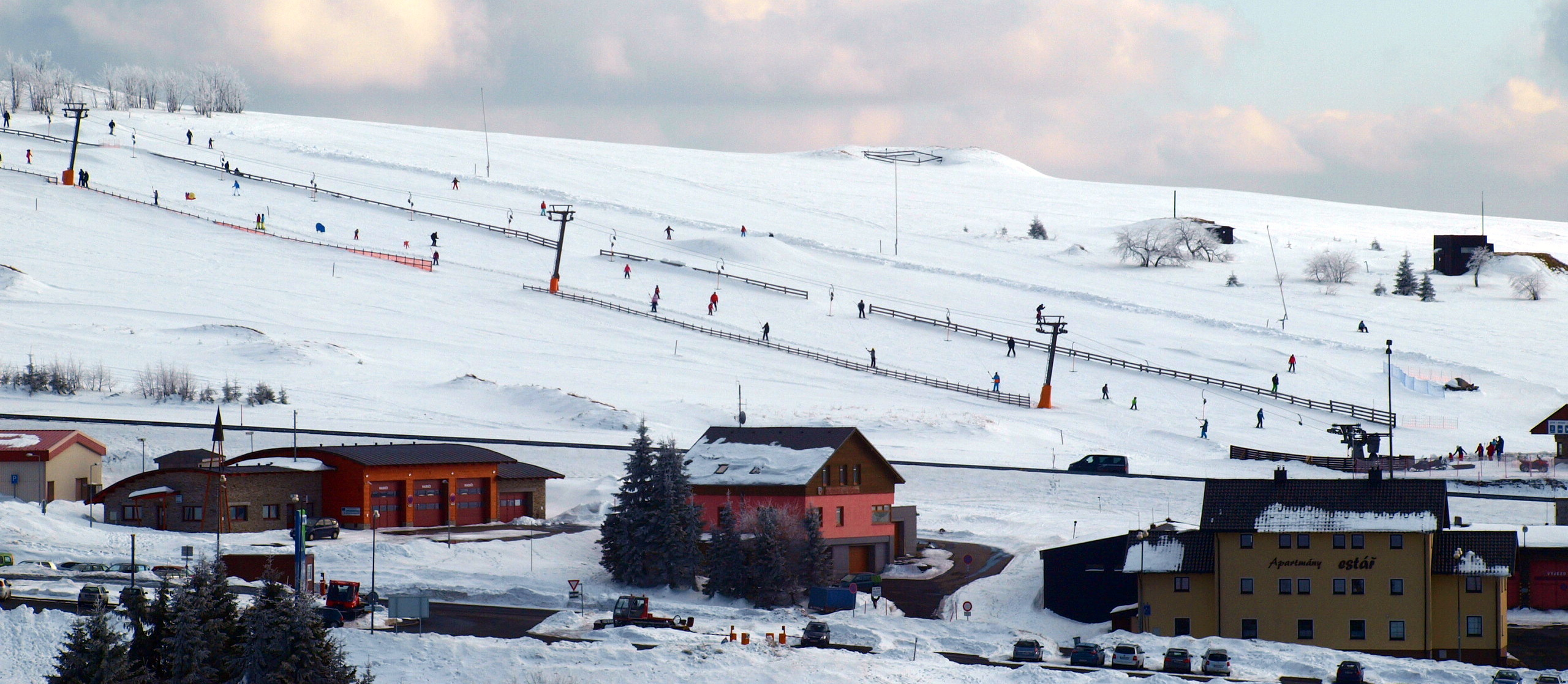 Boží Dar